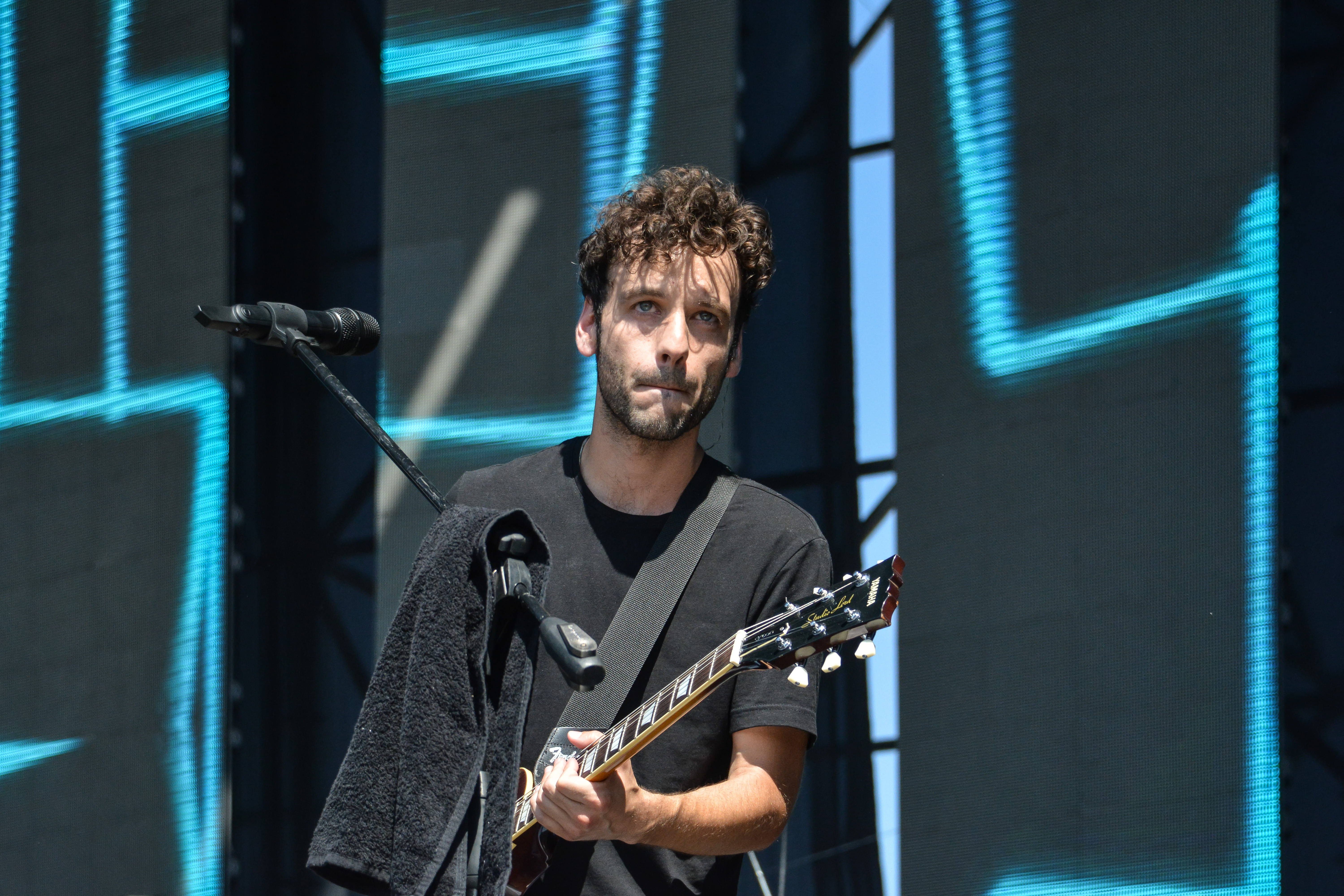 Martín del Real en la Cumbre del Rock Chileno 2018, Santiago, Chile